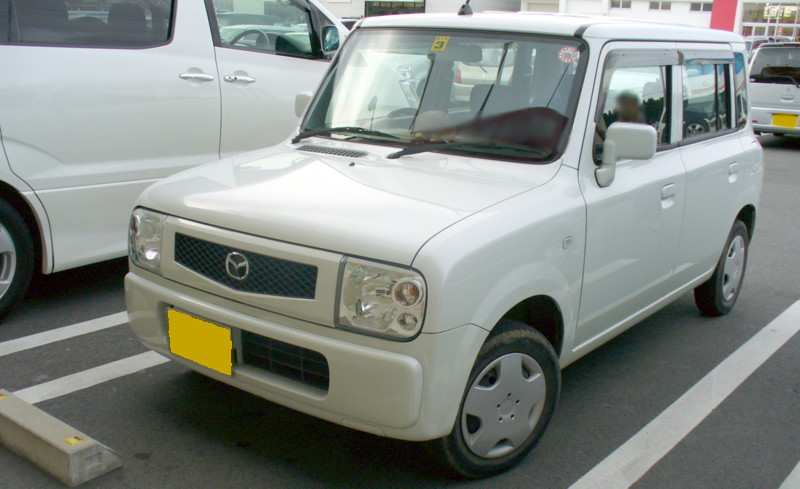 Mazda Spiano (rebadged Suzuki Alto Lapin), photographed in Japan